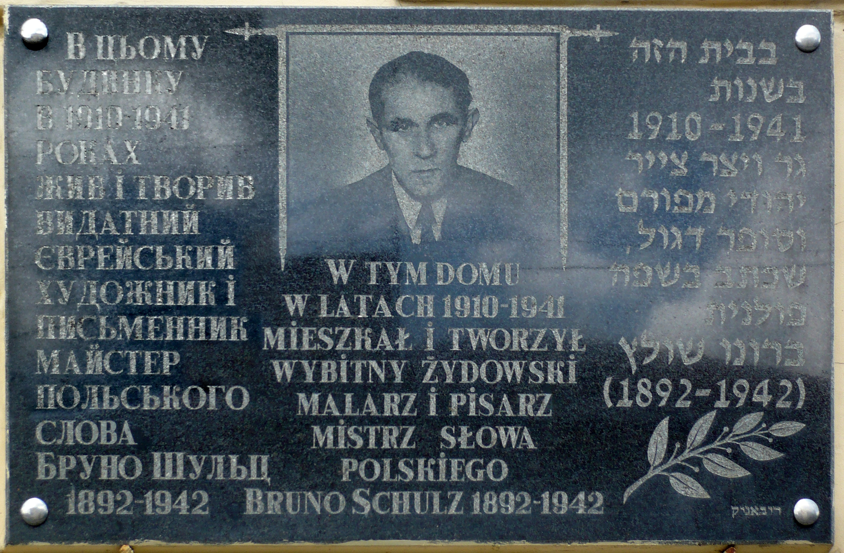 Tablica na ścianie domu B. Schulza